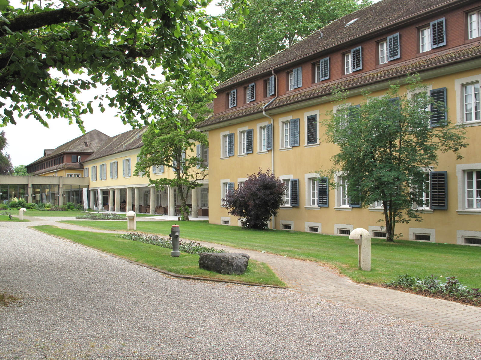 Schinznach Bad, Jennerbauten